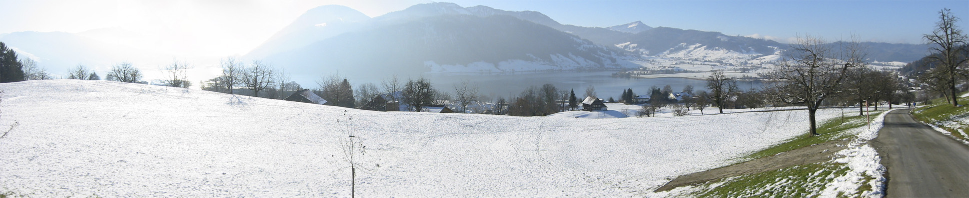 Ägerital im Winter oberhalb von Oberägeri (11.12.2005)